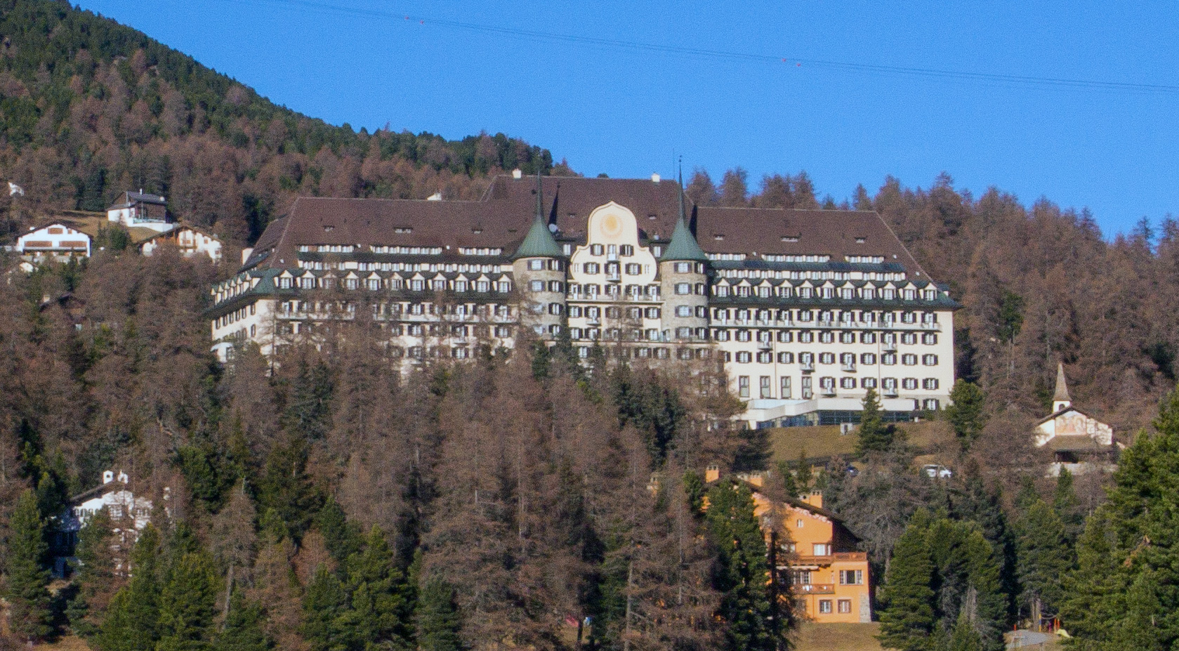 Ansicht Suvretta House 2012